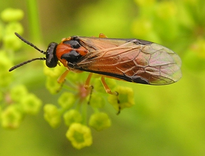 Athalia rosae auf Pastinaca sativa bei Neuss (Deutschland).